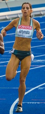 Eleni Artymata, Berlin 2009